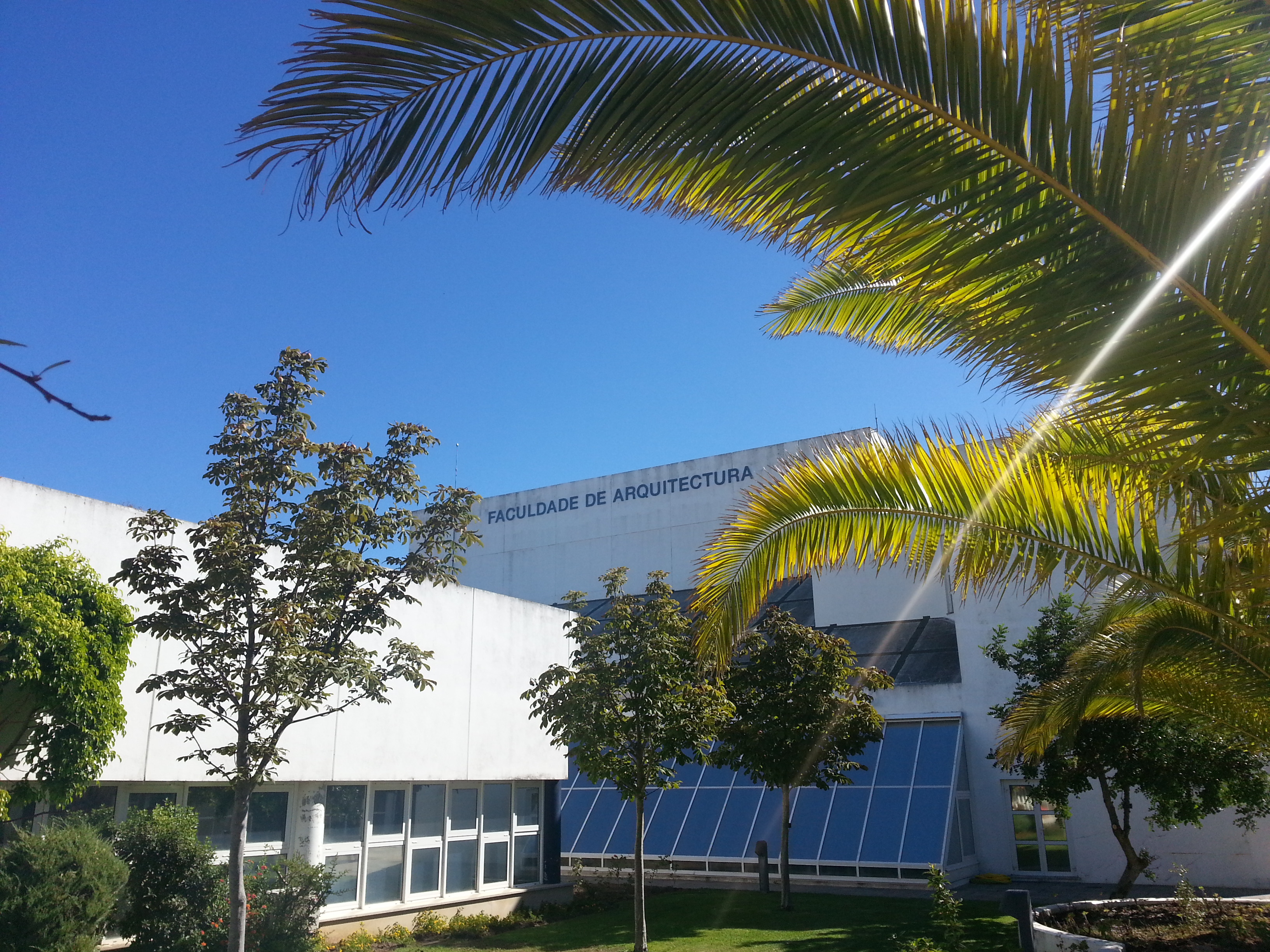 universidade technica de lisboa, faculdade de arquitectura